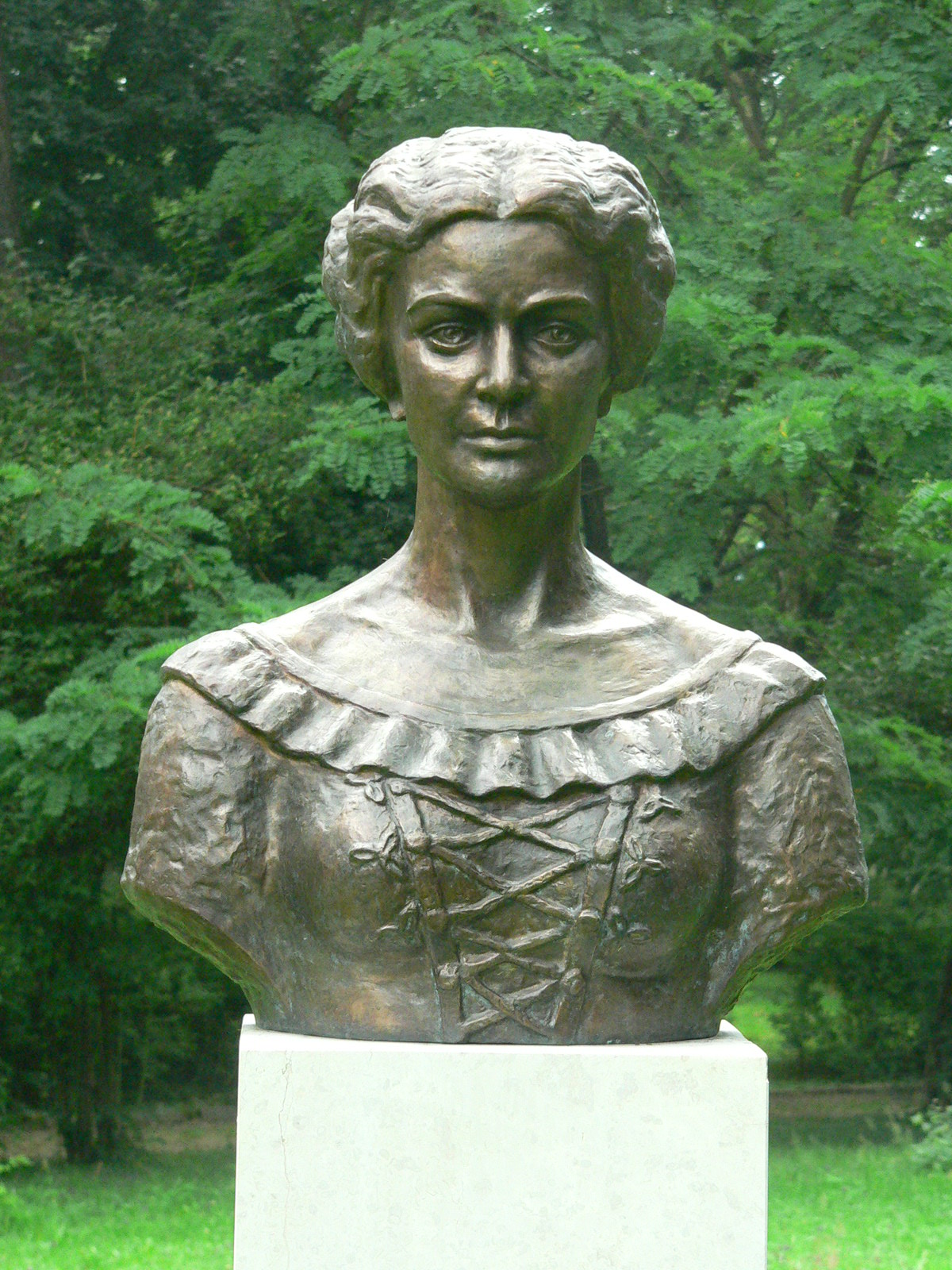 Borsi Antal: Török Sophie mellszobra (2008) a széphalmi parkban, Sátoraljaújhely